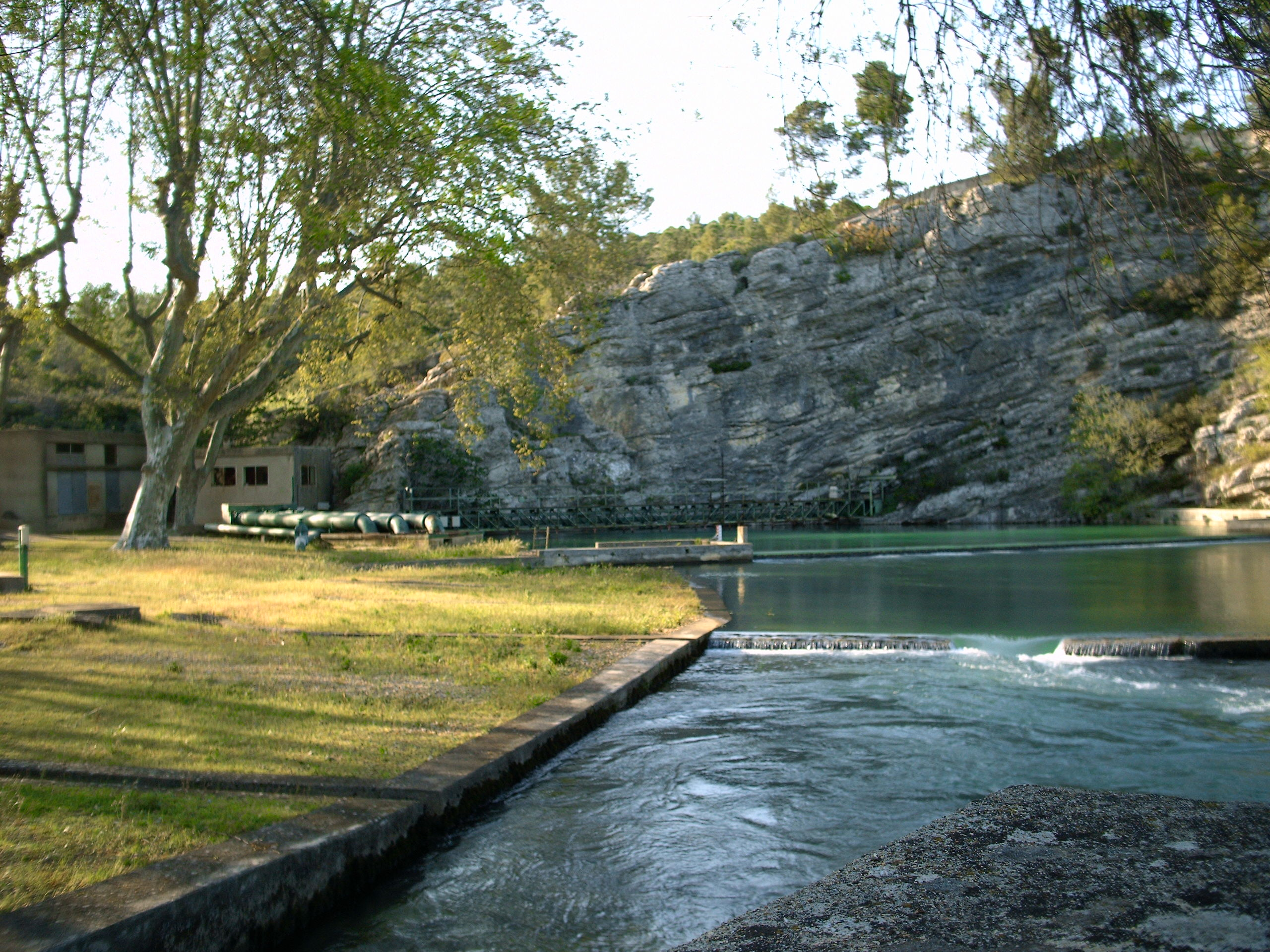 La source du Lez, résurgence du vaste ensemble karstique sous-jacent aux Garrigues nord montpelliéraines. La source est à Saint-Clément-de-Rivière, département Hérault, France.